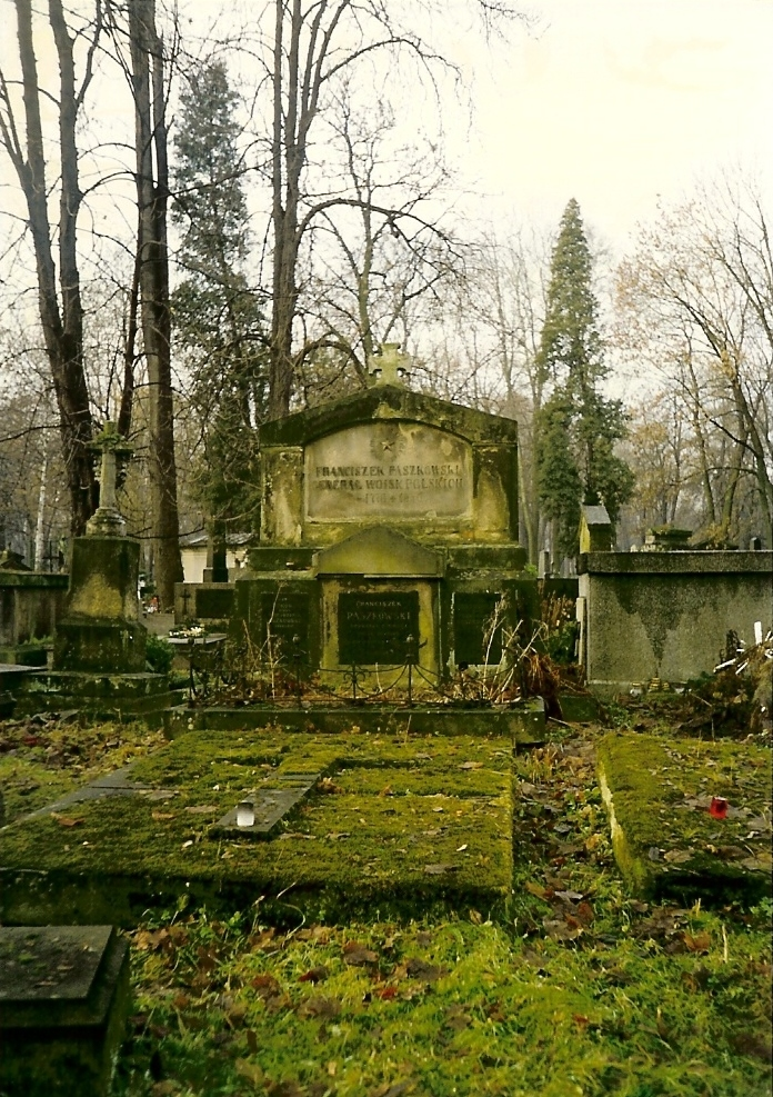 Grobowiec jednego z założycieli TPSP gen. Paszkowskiego